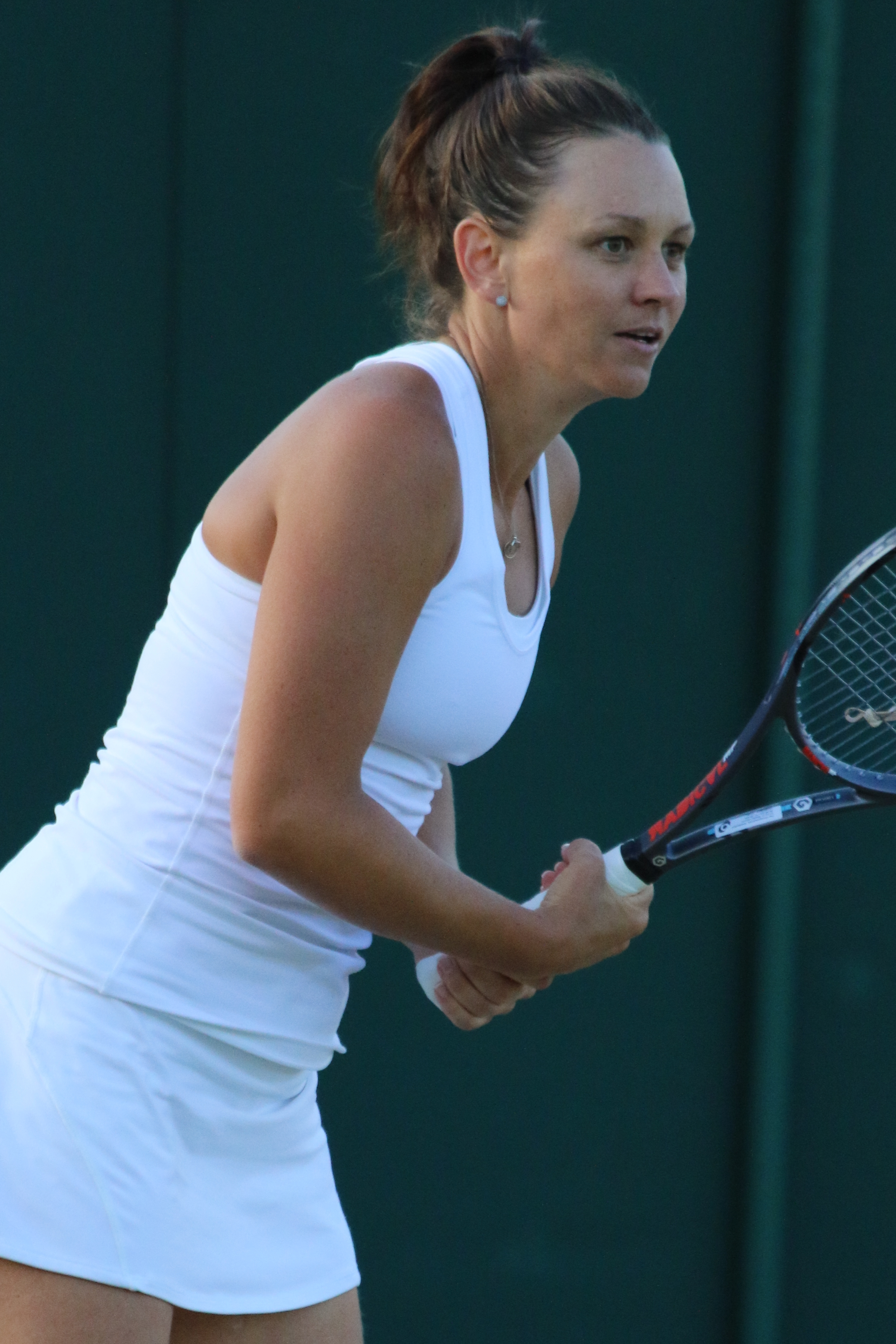 Dellacqua WM17 (6)